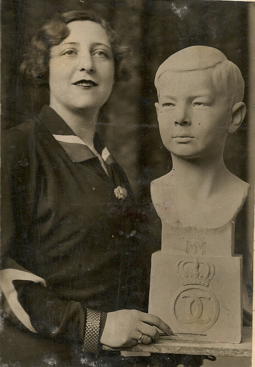 Gosztonyi Alice Mihály király portréjával Bukarestben (1929)